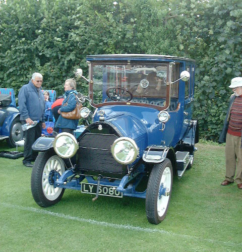 KING automobile, circa 1915